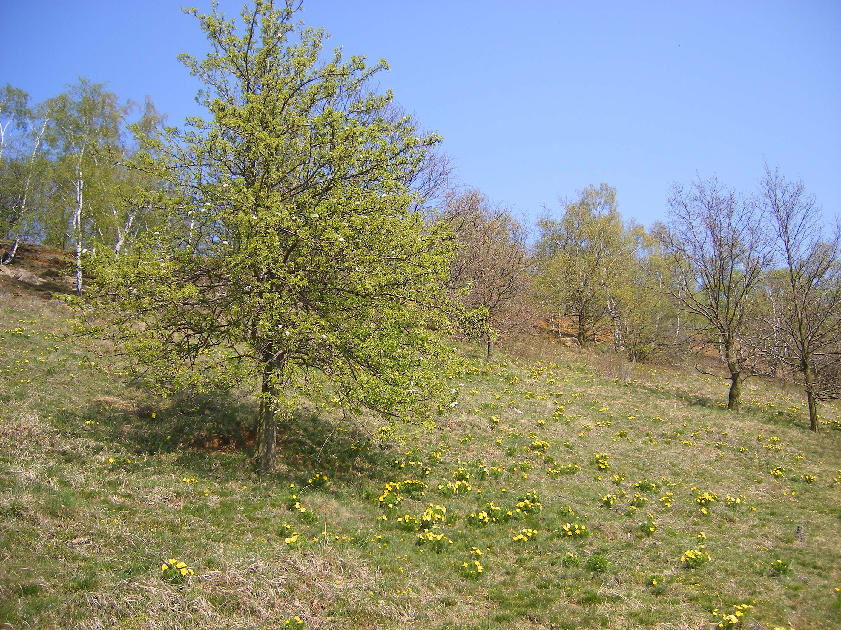 Blüte des Frühlings-Adonisröschens (Adonis vernalis) am Südhang des Weinberges bei Börnecke